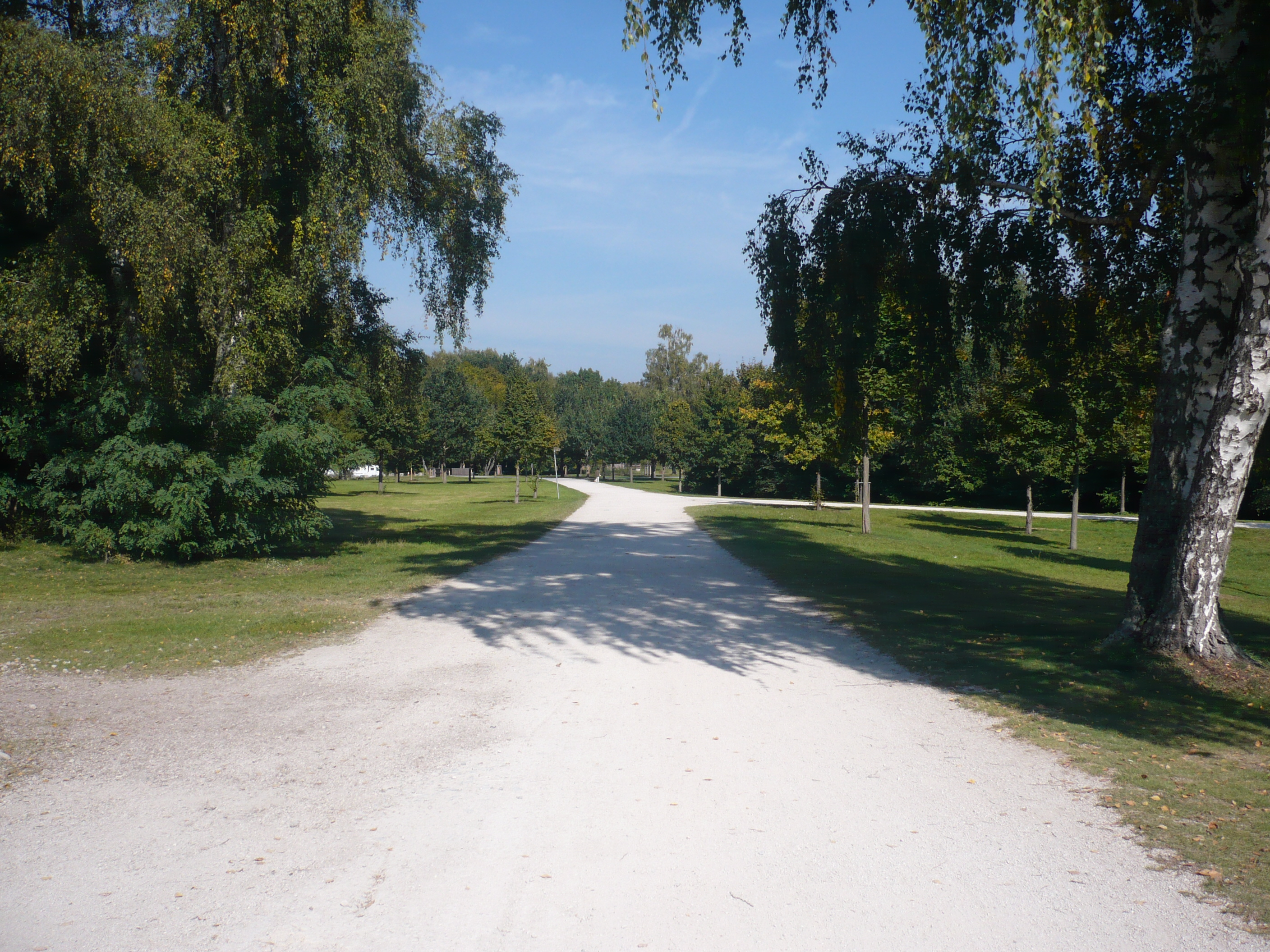 Volkspark Dutzendteich Nuernberg